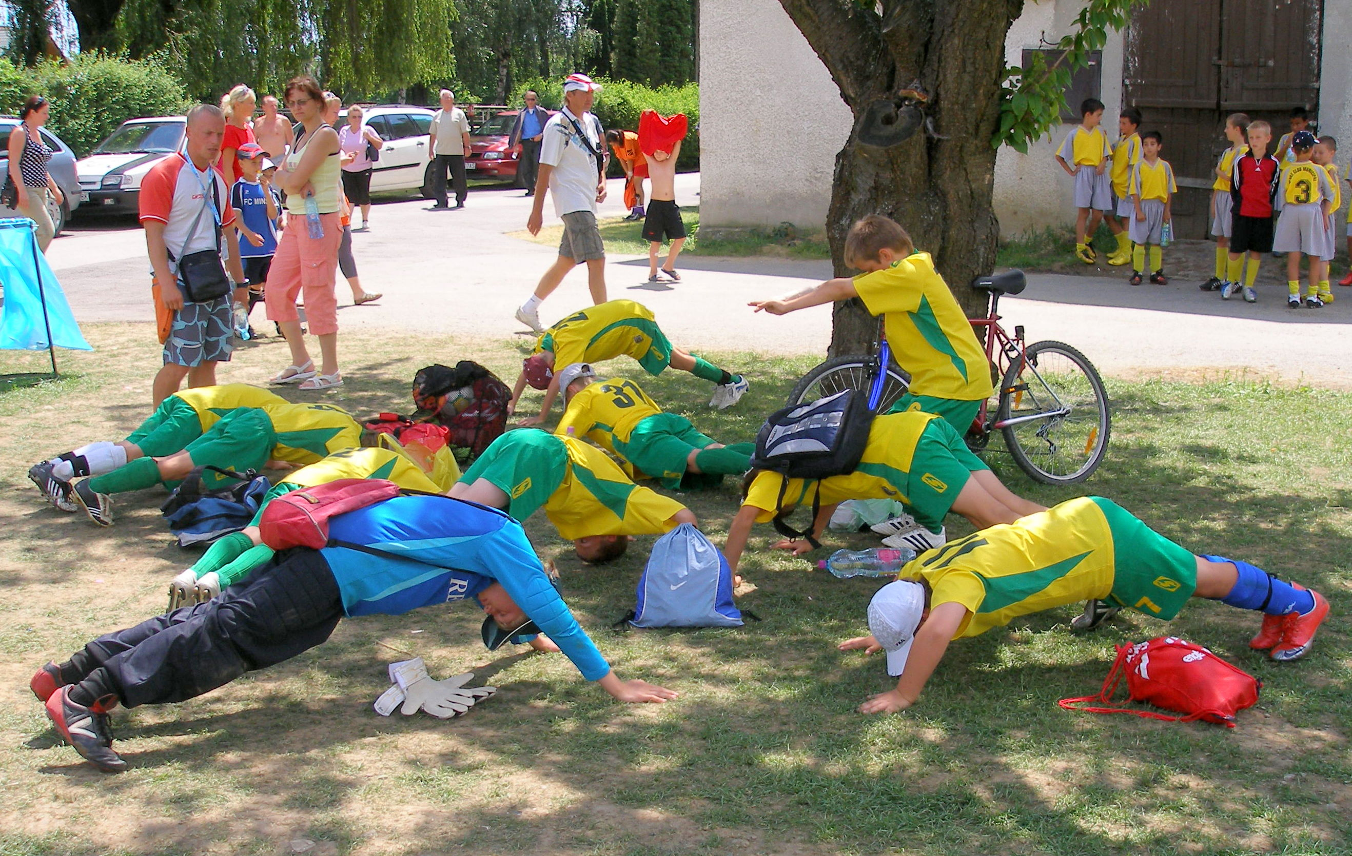 Fragaria cup 2010. Letný, žiacky futbalový turnaj v meste Prešov. 3.7. až 7.7.2010.